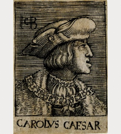 Charles V by Jacob Binck.jpg: портрет імператора Карла V